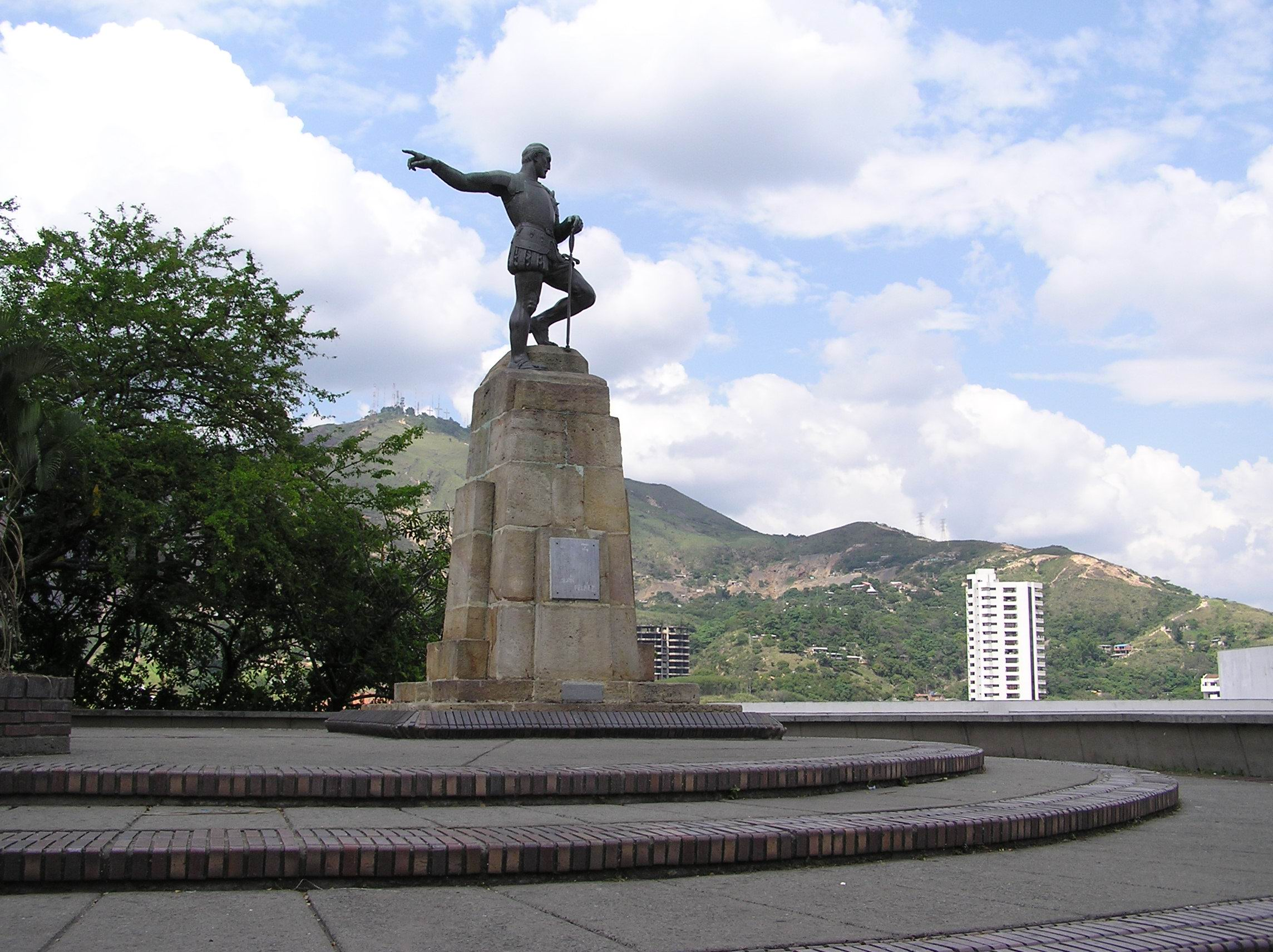 Estatua de Sebastian De Belalcazar, el fundador de Cali.